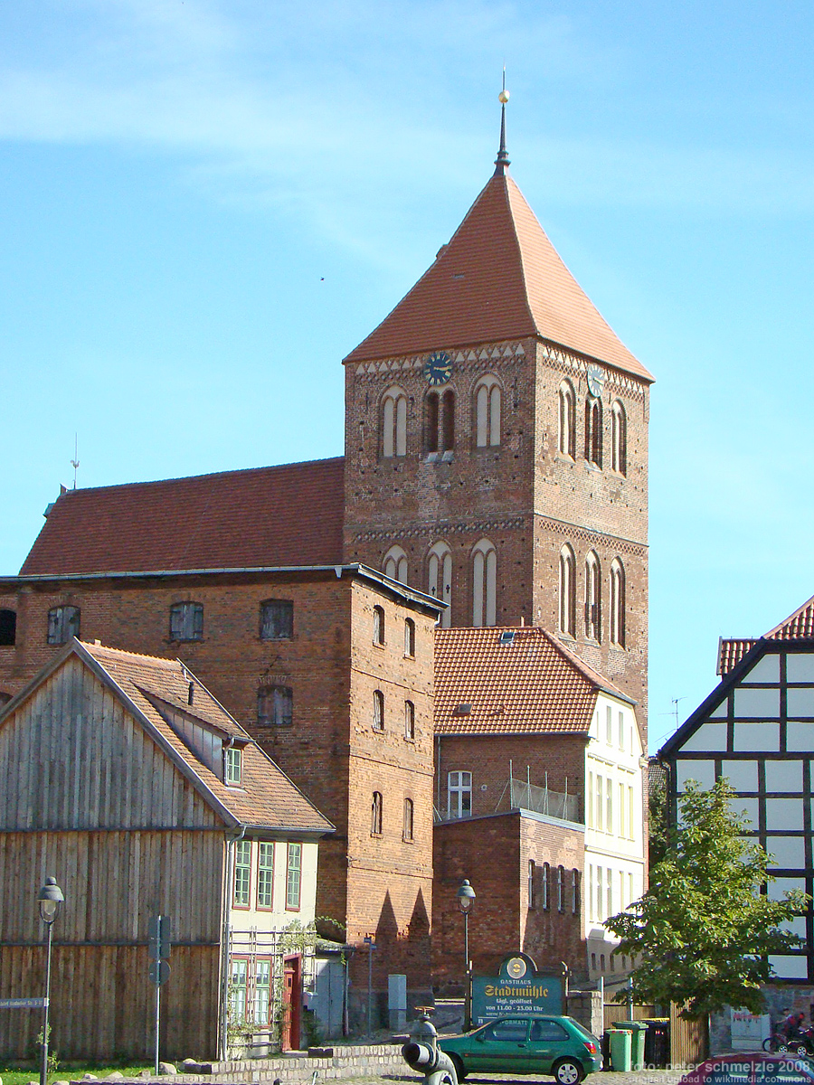 Blick vom Mühlteich zur Stadtkirche in Teterow